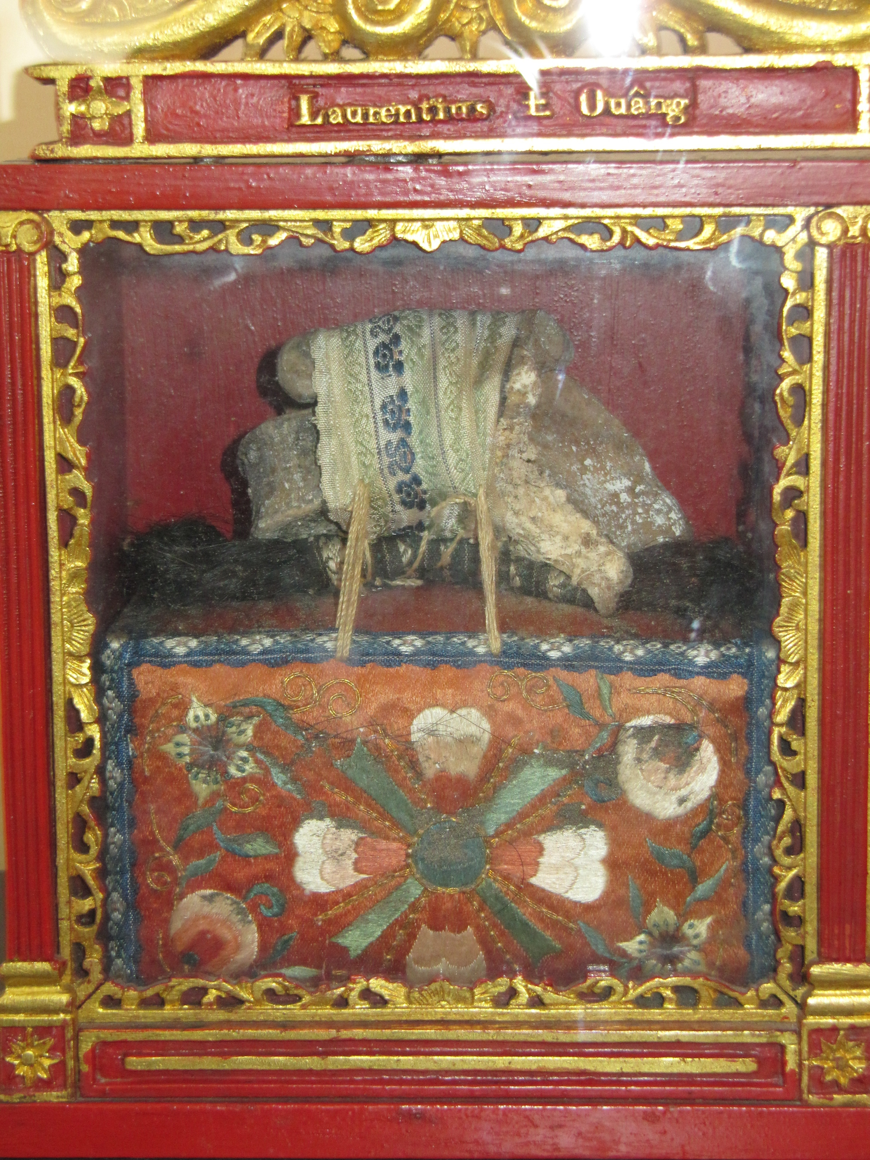 Мощи святого Лаврентия Ван Бин, музей "Дом Паулины Жарико", Лион, Франция